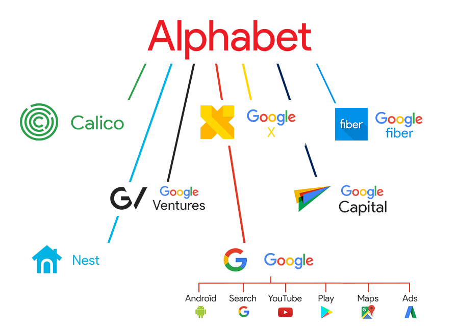 Cet organigramme représentes les différentes filiales d'Alphabet (Travail inspiré de celui de Alvandria (